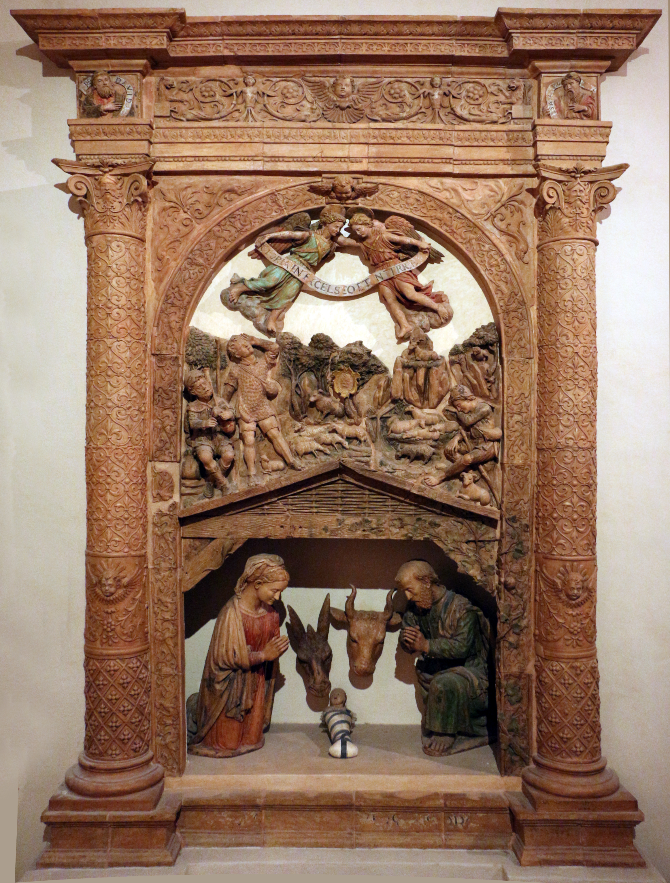 Pinacoteca Civica, Palazzo Pianetti This is a photo of a monument which is part of cultural heritage of Italy.